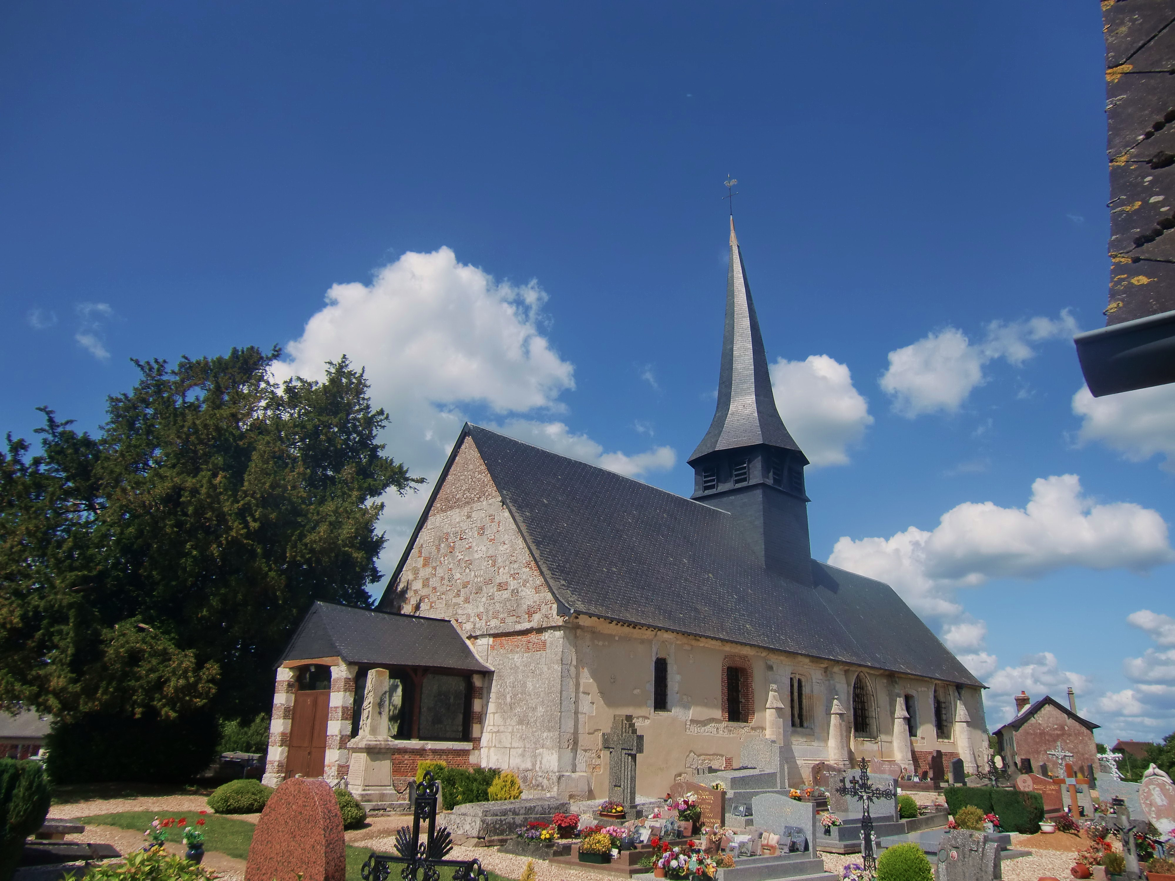 Église d'Épreville-en-Roumois (Eure, Normandie, France)